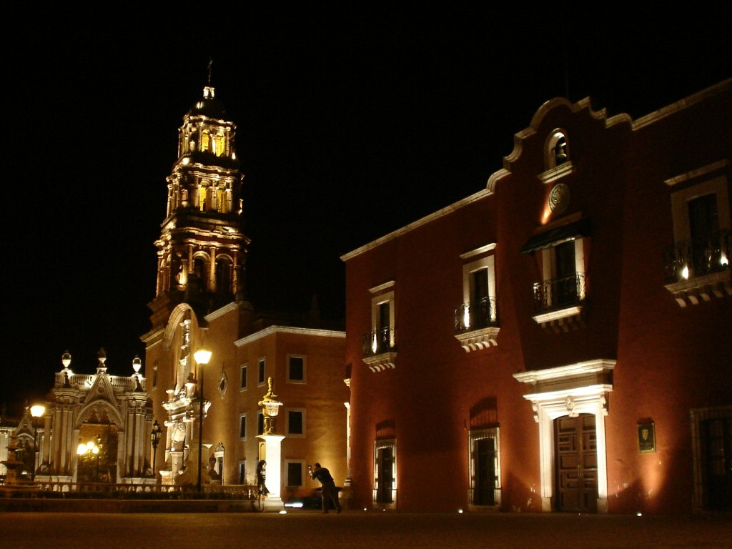 Palacio municipal e iglesia de la Purificacion